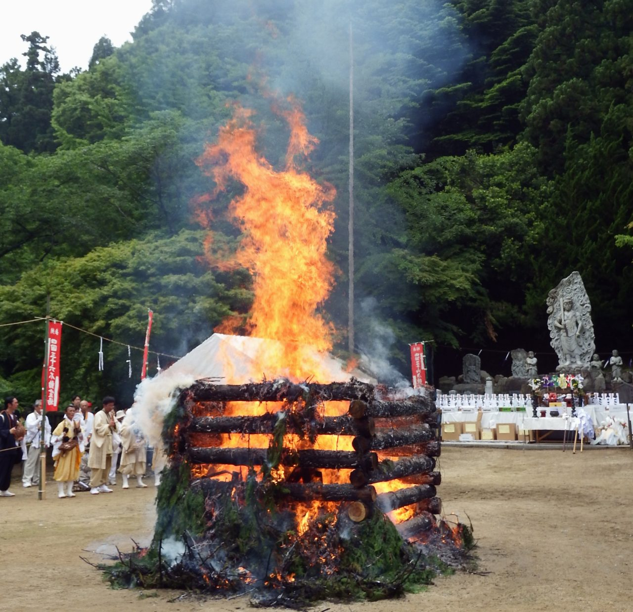 箸蔵寺で行われた不動の火祭り